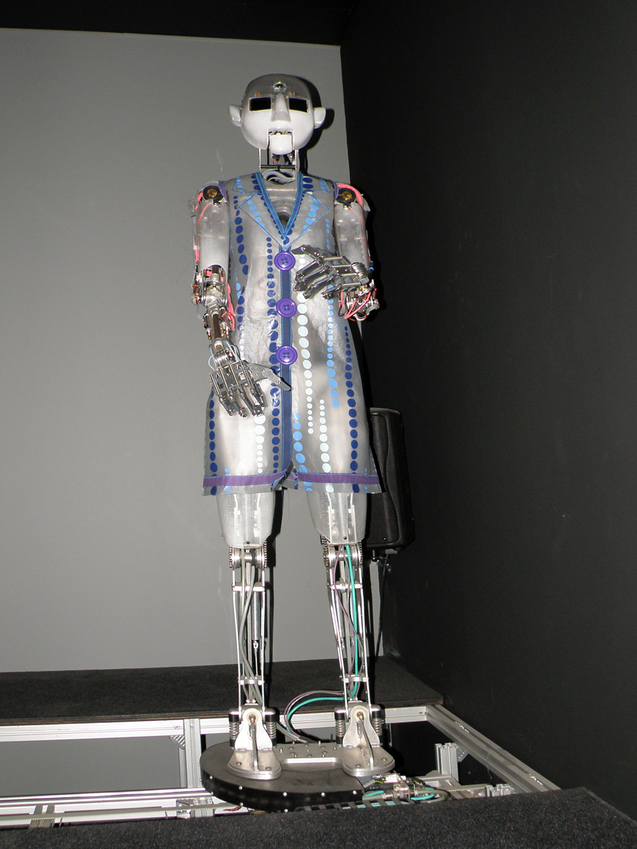 Warszawa - Centrum Nauki Kopernik - Teatr Robotyczny; Tajemnica Pustej Szafy, czyli Duchy z czwartego wymiaru na podstawie powieści "Flatland: A Romance of Many Dimensions" Edwina Abotta